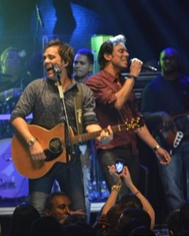 A dupla sertaneja brasileira Guilherme e Santiago